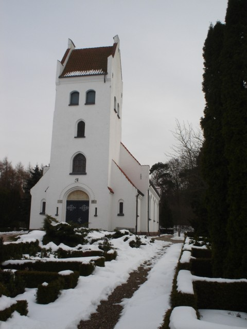 Nivaa kirke Nivaa church, Denmark